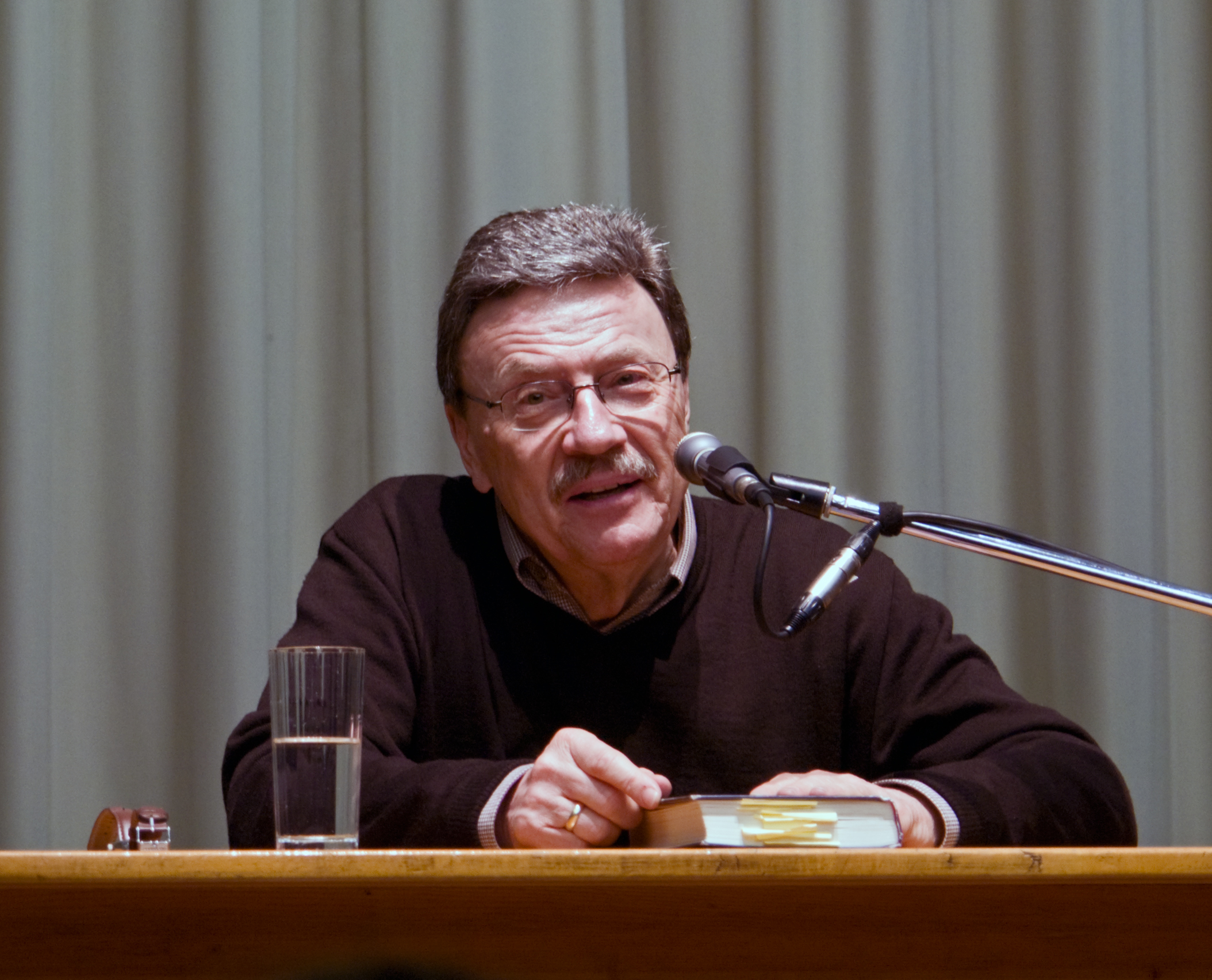 Klaus Kordon, Köln, Lesung am 26. Februar 2208